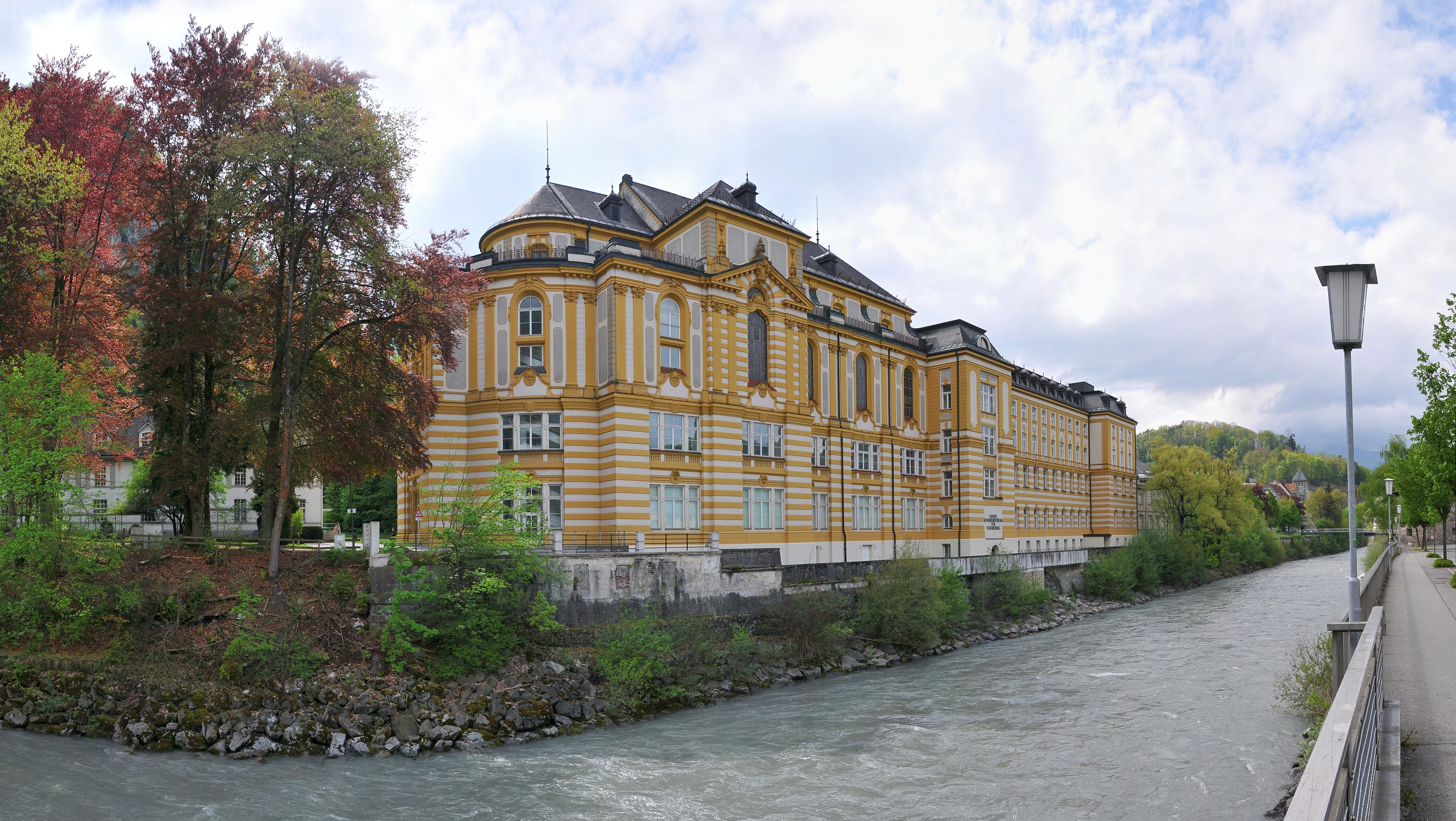 das Stella Matutina, heute Landeskonservatorium wurde 1899 durch Peter Hutter in Feldkirch, Vorarlberg erbaut.